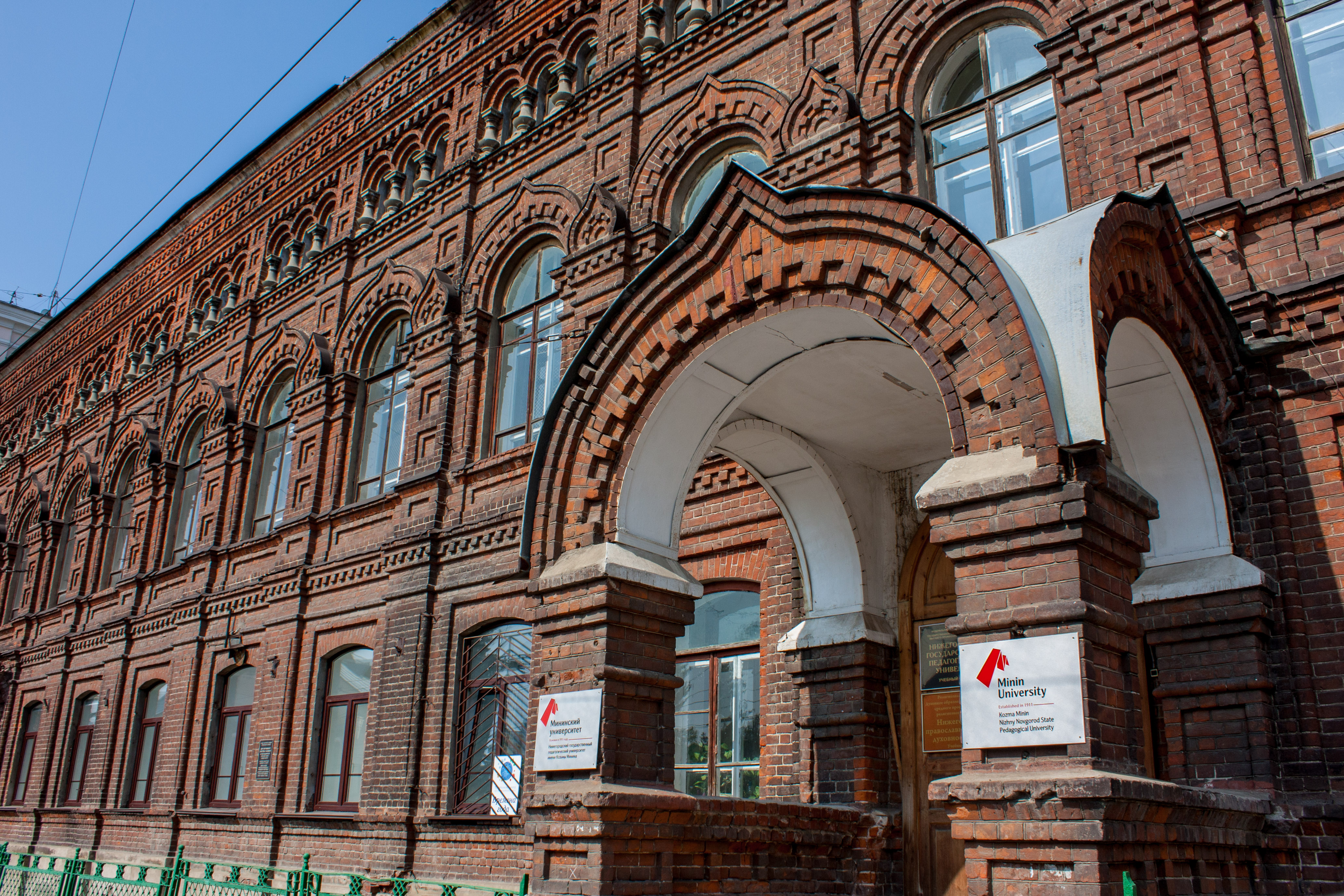 3 корпус